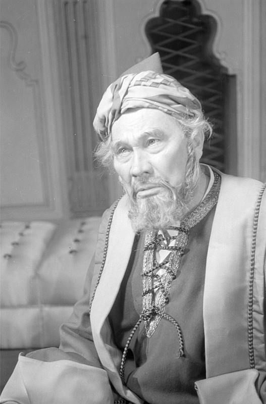 Original image description from the Deutsche Fotothek Paul Wegener in der Titelrolle, Agathe Poschmann als Recha, Kai Möller als Sultan Saladin und Eduard von Winterstein als Klosterbruder